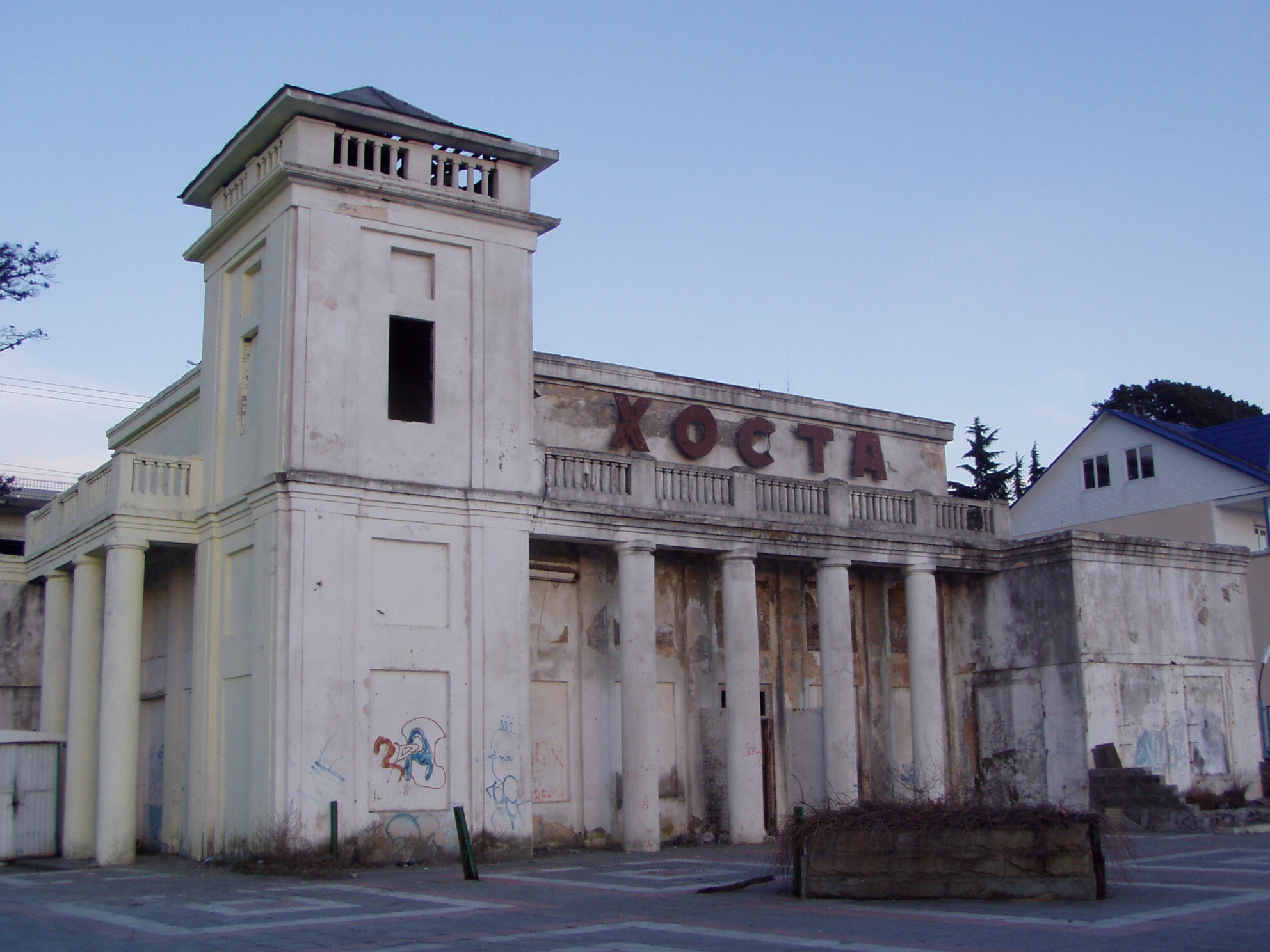 Здание морского вокзала в Хосте